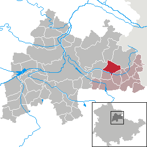 Olbersleben in Thuringia - District Sömmerda